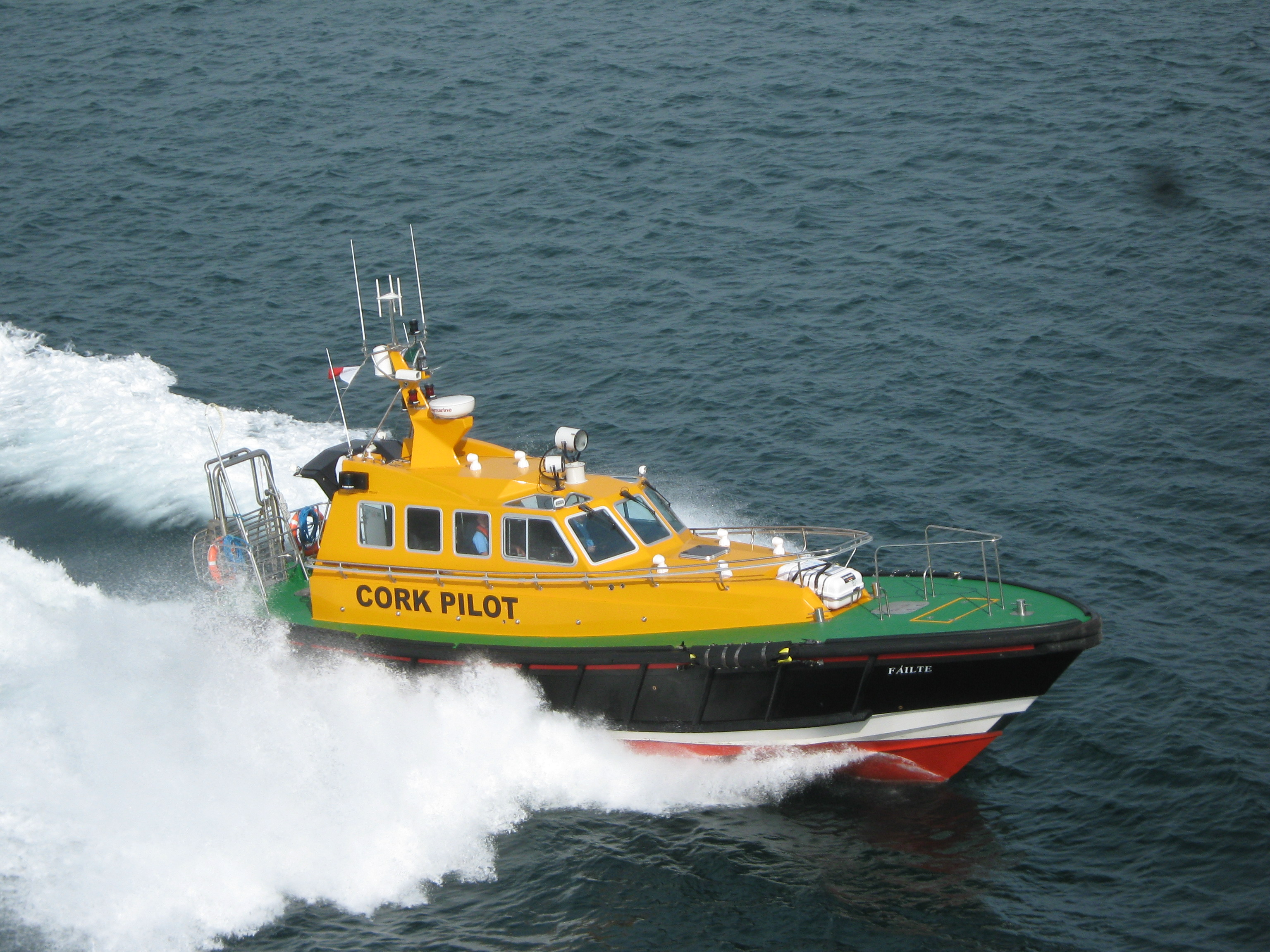 Navire pilote dans le port de Cork